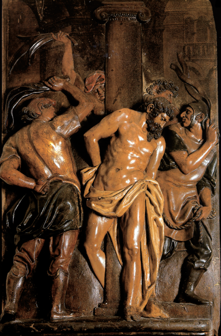 Zigorkatzearen erliebea Migel santuaren elizan.